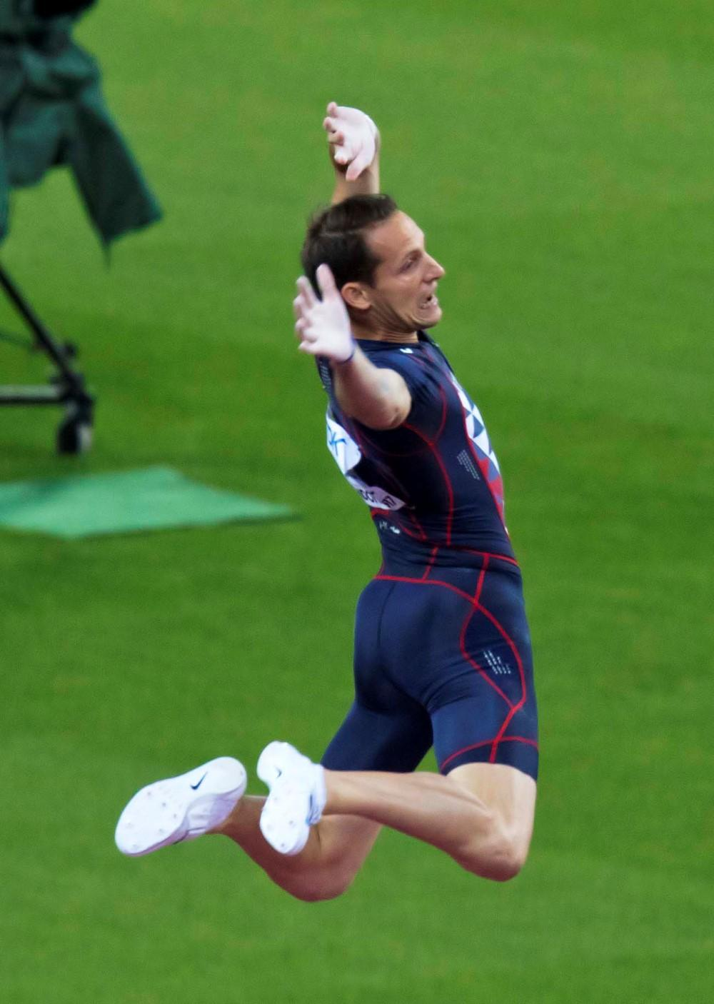 d4_37 polsstok lavillenie